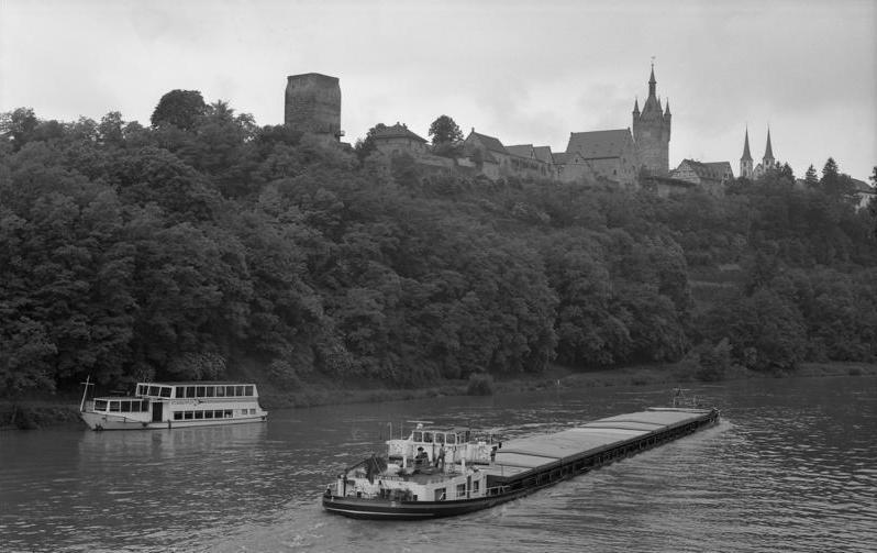 Juni 1988 Bad Wimpfen bei Heilbronn